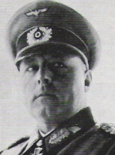 Il generale Hans Hube, comandante della 16. Panzer-Division e del 14° Panzerkorps nella battaglia di Stalingrado